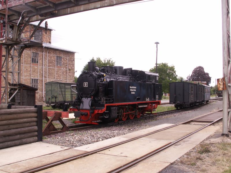 Mansfelder Bergwerksbahn